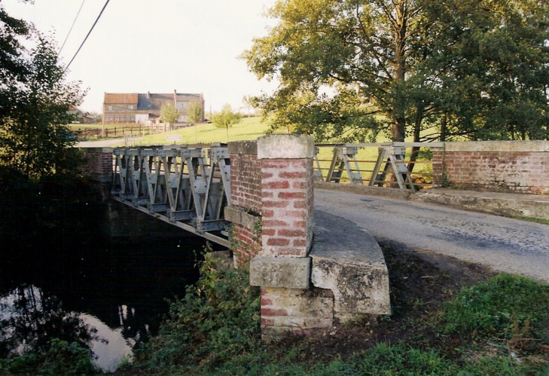 Pont Callender-Hamilton au hameau de Caparmesnil (commune du Mesnil-Mauger). La technique de ce pont a été employée à Vernon pour le pont provisoire Clemenceau dès après la Libération.